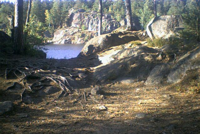 Lake Gömmaren in Glömsta area, Huddinge, Sweden